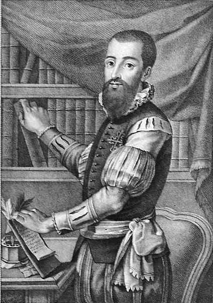 Retrato de Garcilaso de la Vega por José Maea y Bartolomé Vázquez, Madrid, Imprenta Real, 1791